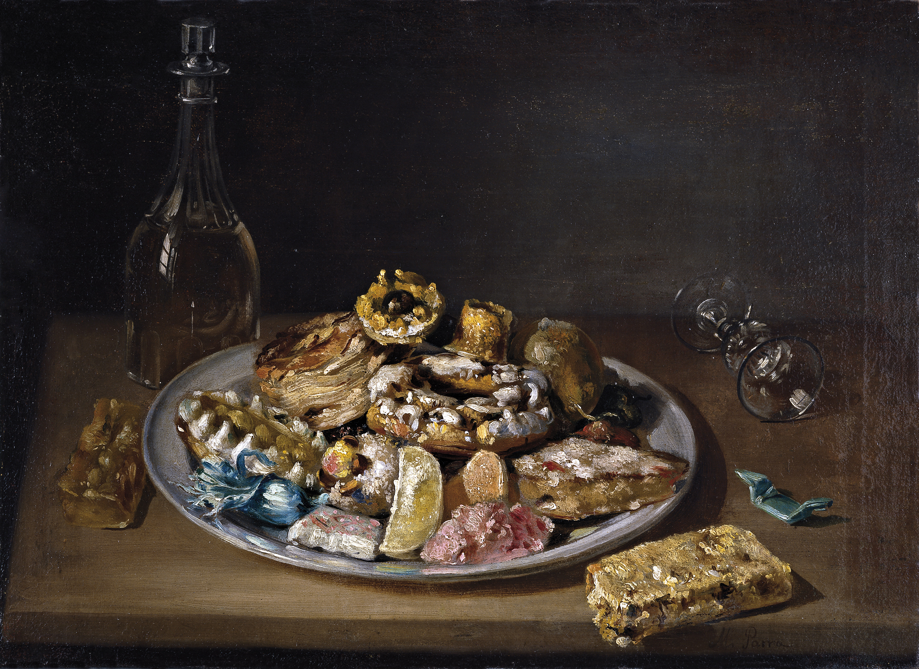 La obra representa un plato de dulces.